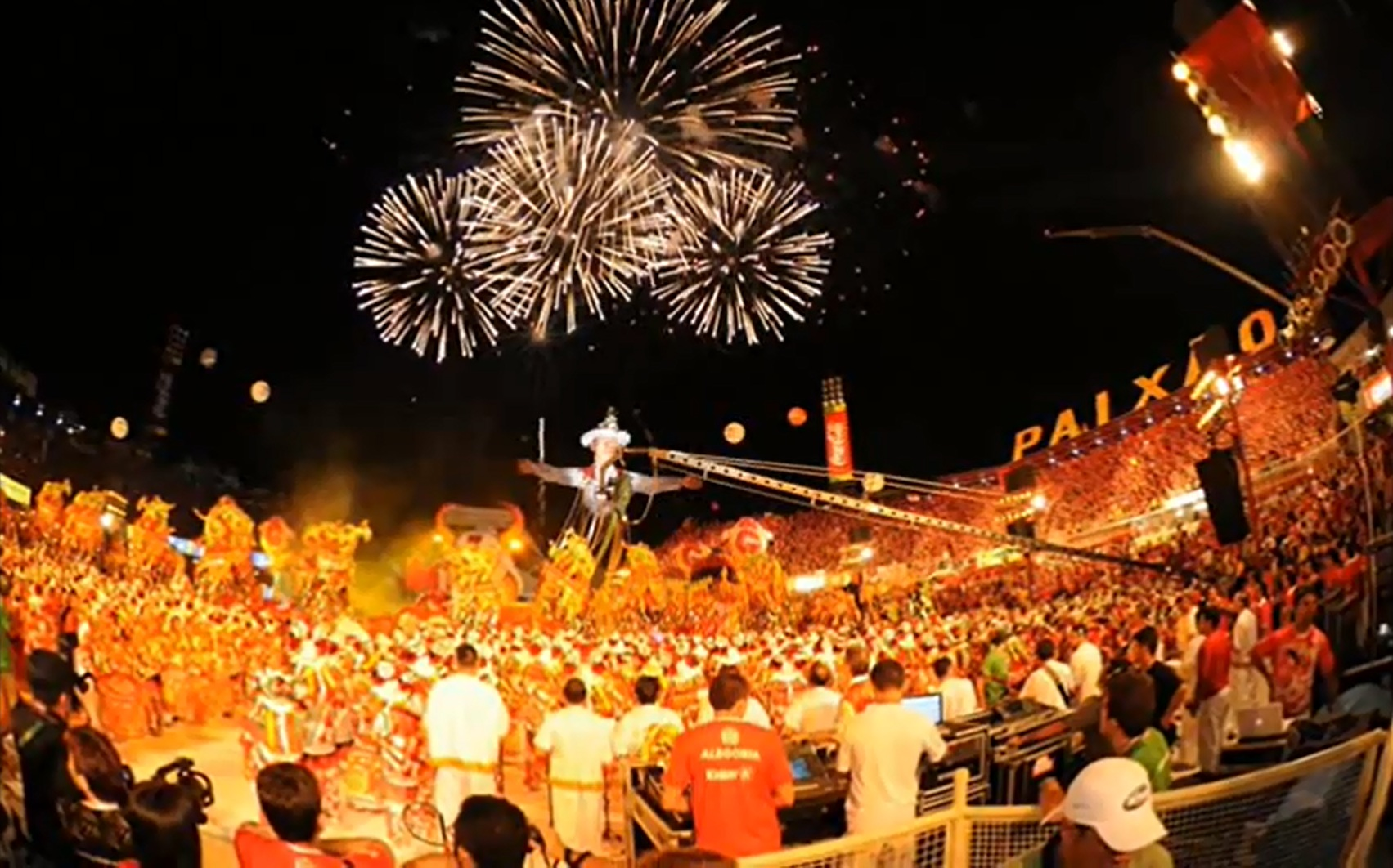 Imagen en JPG del Bumbódromo en el Festival Folclórico de Parintins